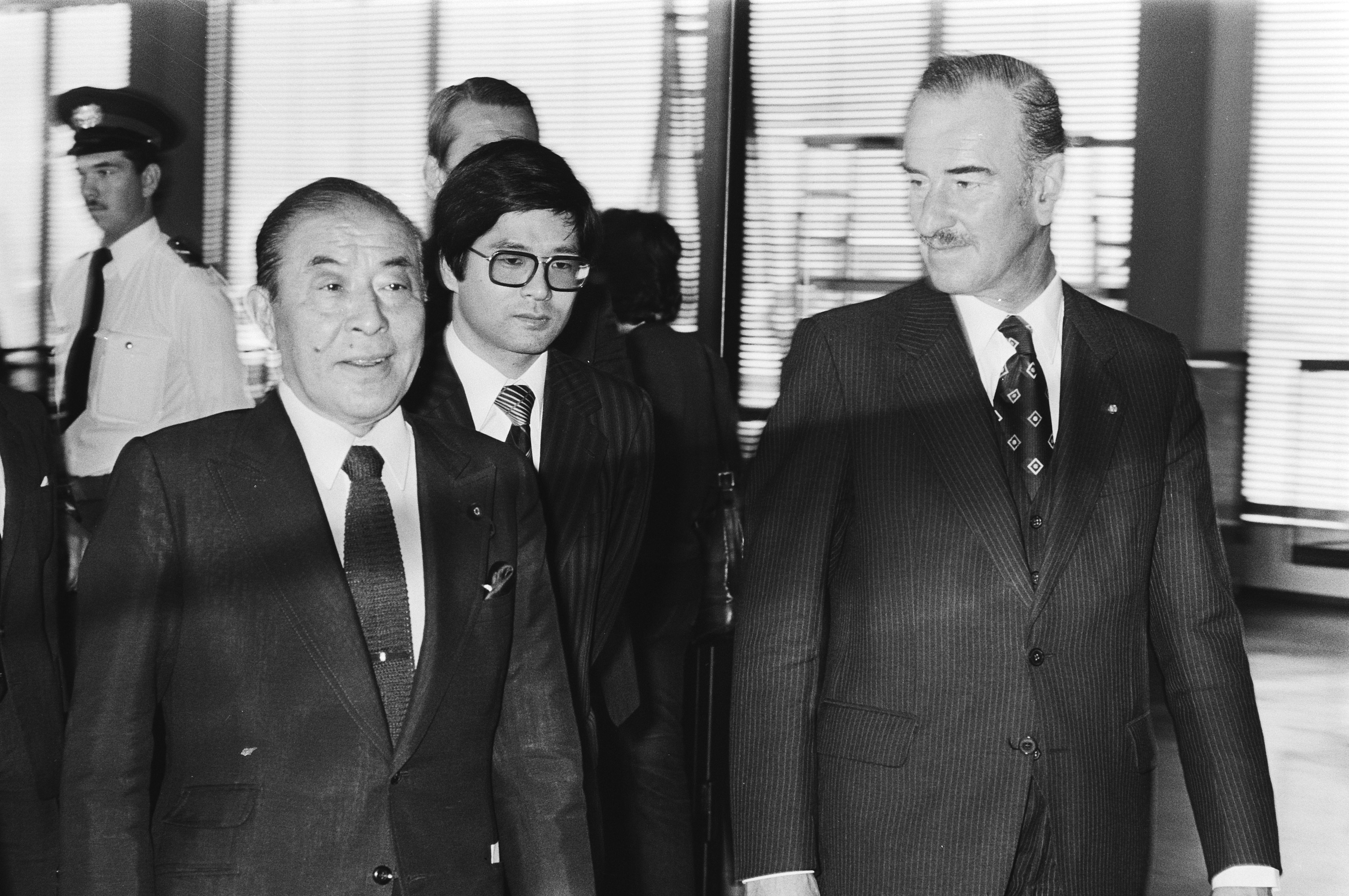 Collectie / Archief : Fotocollectie Anefo Reportage / Serie : Japanse minister van Buitenlandse Zaken Suhao Somoda op Schiphol, afgehaald door minister Van der Klaauw, Buitenlandse Zaken (r) Beschrijving : ministers, aankomst en vertrek, Klaauw, Chris van der, Somoda, Suhau Datum : 31 juli 1979 Locatie : Noord-Holland, Schiphol Trefwoorden : aankomst en vertrek, ministers Persoonsnaam : Klaauw, Chris van der, Somoda, Suhau Fotograaf : Suyk, Koen / Anefo Auteursrechthebbende : Nationaal Archief Materiaalsoort : Negatief (zwart/wit) Nummer archiefinventaris : bekijk toegang 2.24.01.05 Bestanddeelnummer : 930-3804